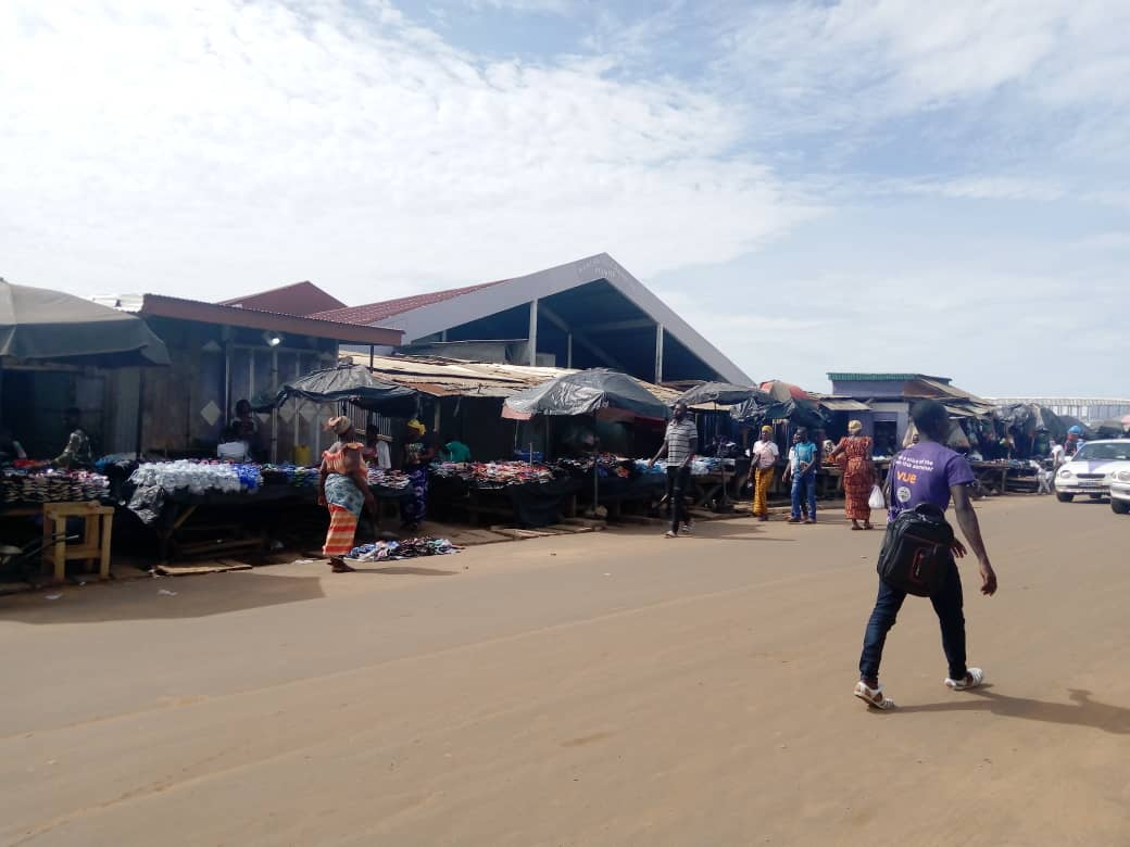 vue du grand bâtiment du marché